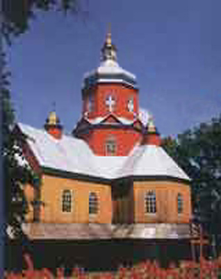 Cerkiew w Medenice.